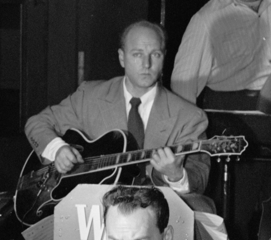 Jazz guitarist Billy Bauer